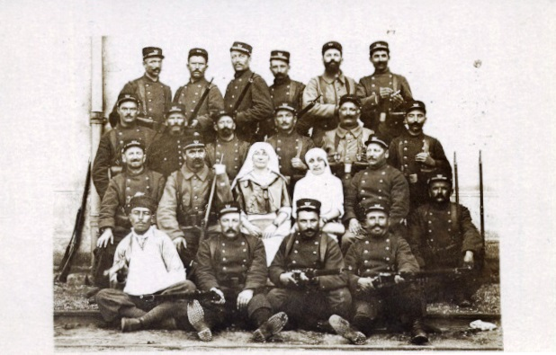 Chasseurs forestiers possiblement en protection d'un hospital de campagne vers 1916. Un soldat colonial en chéchia figure au premier plan à gauche.